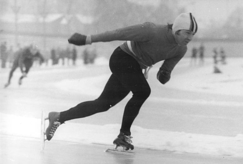 Klaus Knauer ADN-ZB Mittelstädt 20.1.73-th-Berlin: DDR-Sprintmeiterschaften im Eisschnellauf (Dynamo-Sportforum)-Bei den Herren setzte sich am ersten Tag (20.1.73) über 500 m der Dresdner Klaus Knauer mit für diesen Witterungsverhältnisse guten 41,6 s durch. Er gilt auch als Favorit für den zweiten Tag, an dem ebenfalls 500 m und 1000 m gelaufen werden müssen. Abgebildete Personen: Knauer, Klaus: Eisschnelläufer, DDR